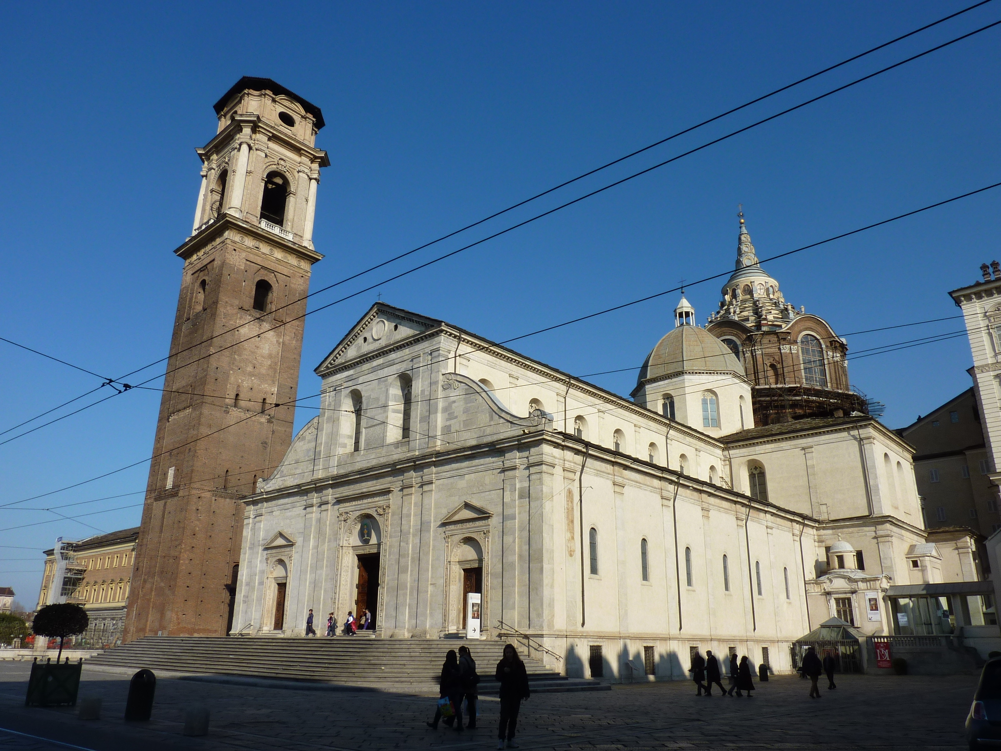 Torino: Cattedrale Metropolitana di San Giovanni Battista.